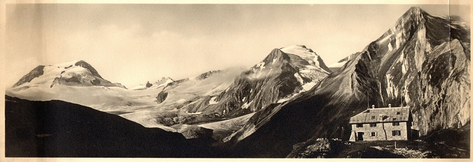 Foto del 1935 del rifugio inaugurato nel 1928